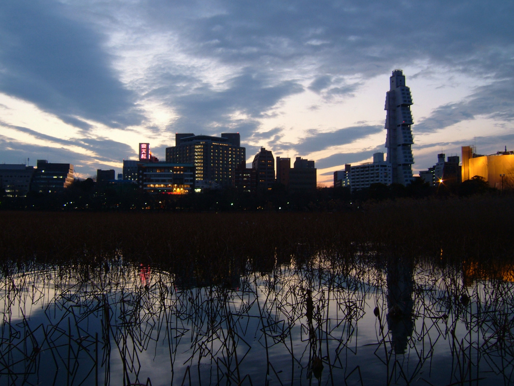 夕暮れの不忍池（東京・台東区の上野公園）Shinobazu-ike